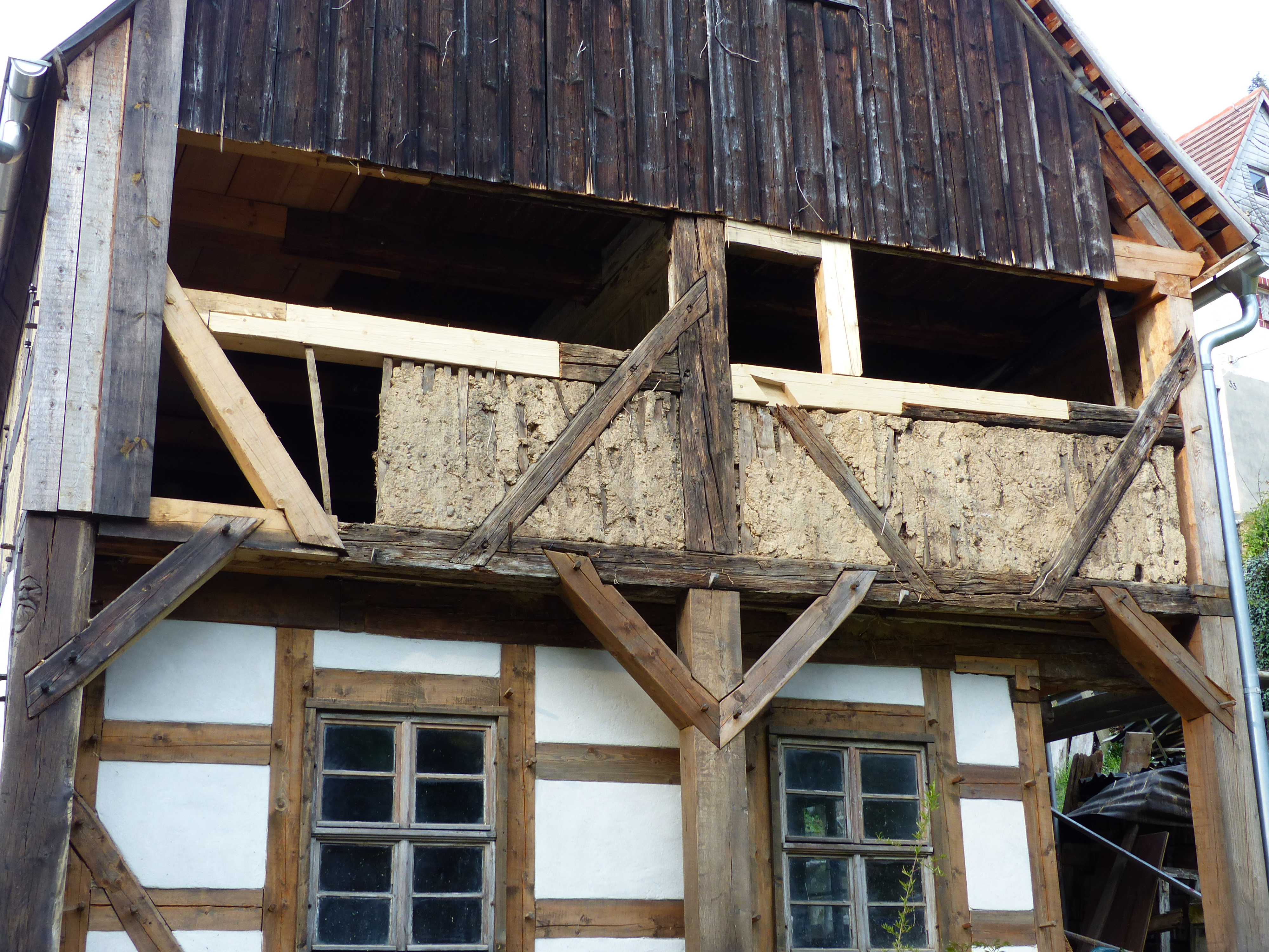 Umgebindehaus Pfaffenberg 31, Königstein (Sächsische Schweiz)